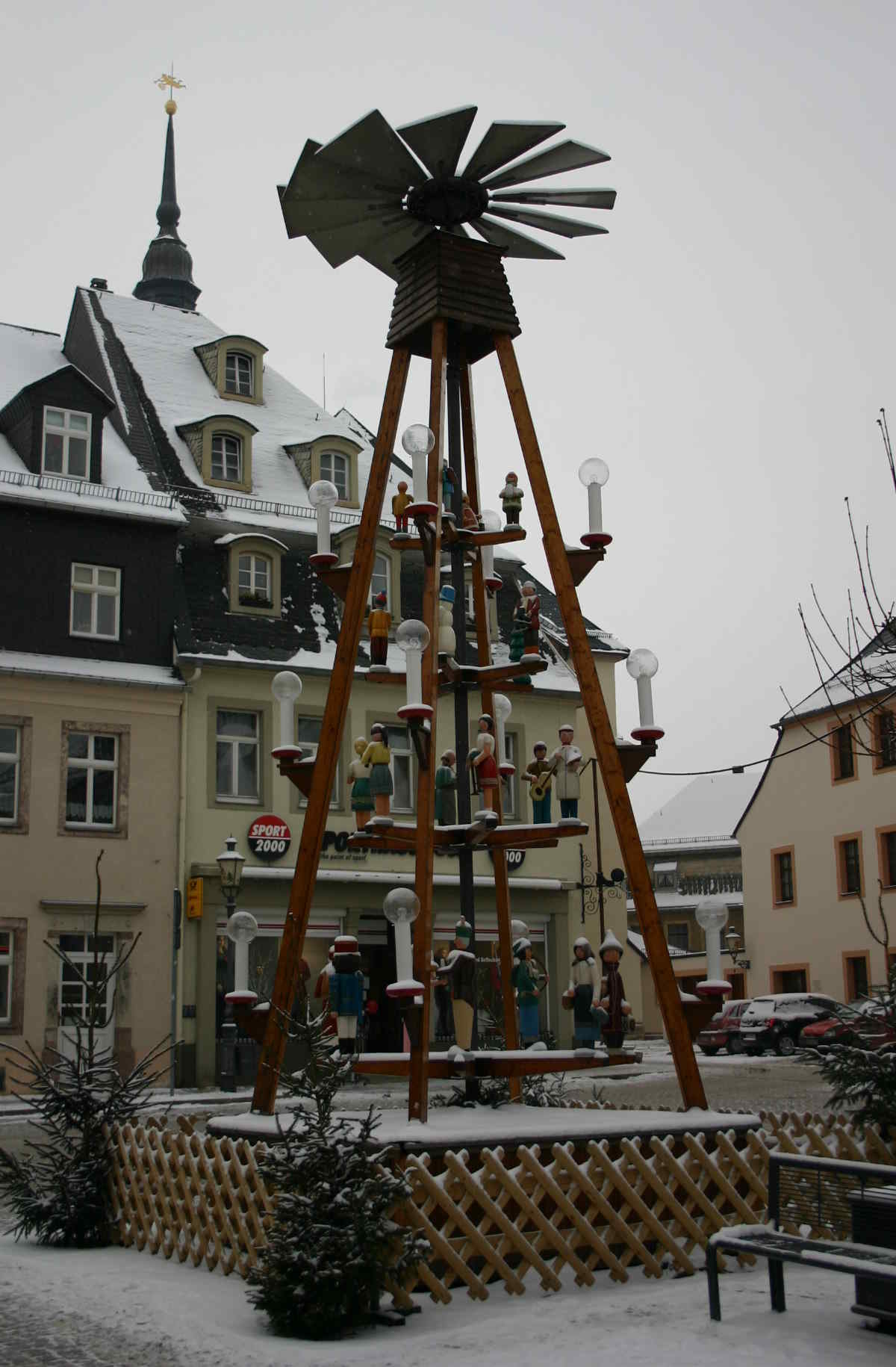 Die Zschopauer Ortspyramide